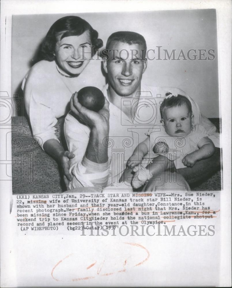 1957 Press Photo Sue Nieder Bill Nieder Missing - RRQ21515